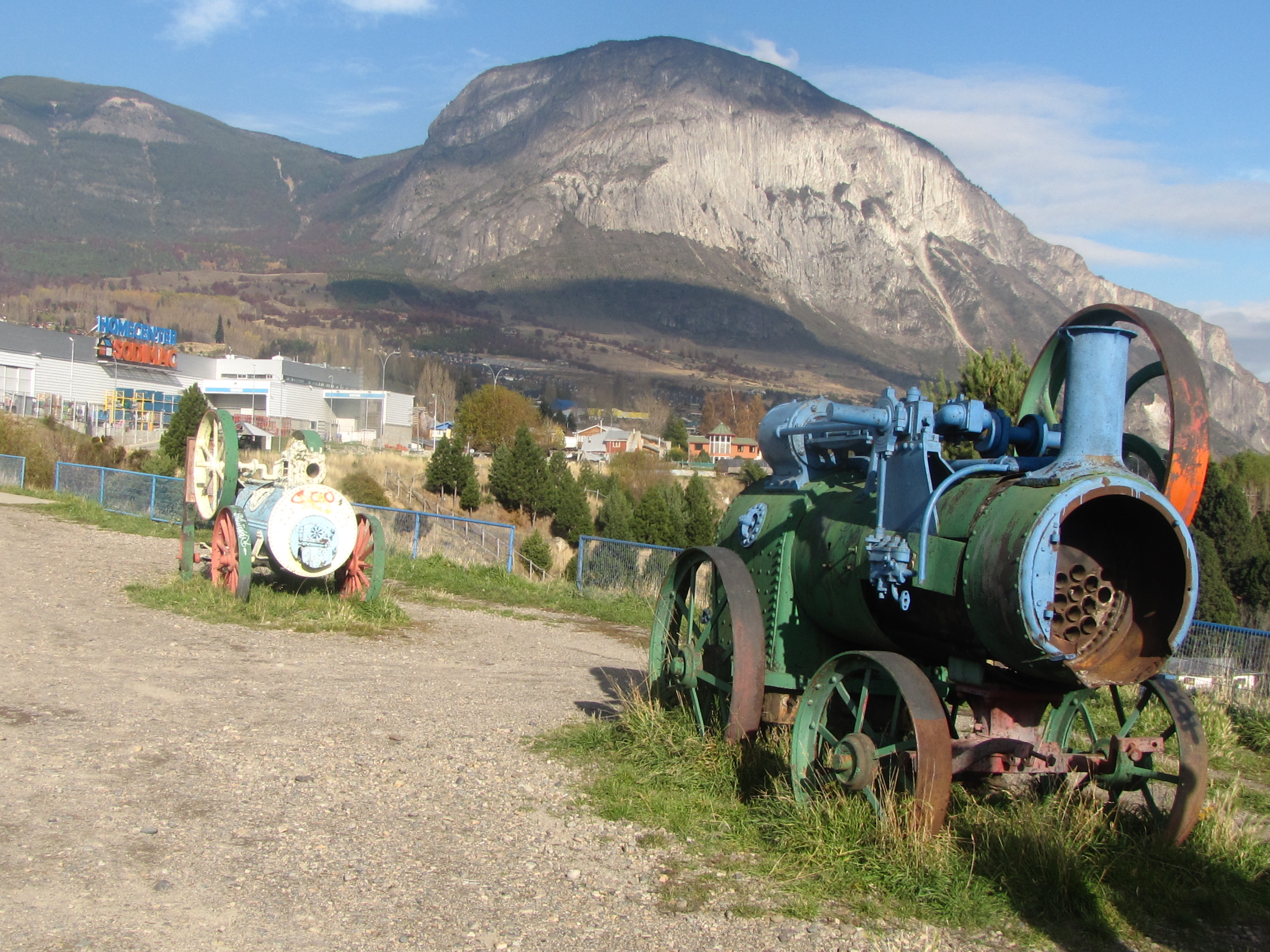 Locomóviles y el cerro Mackay, Coyhaique, región de Aysén, Chile